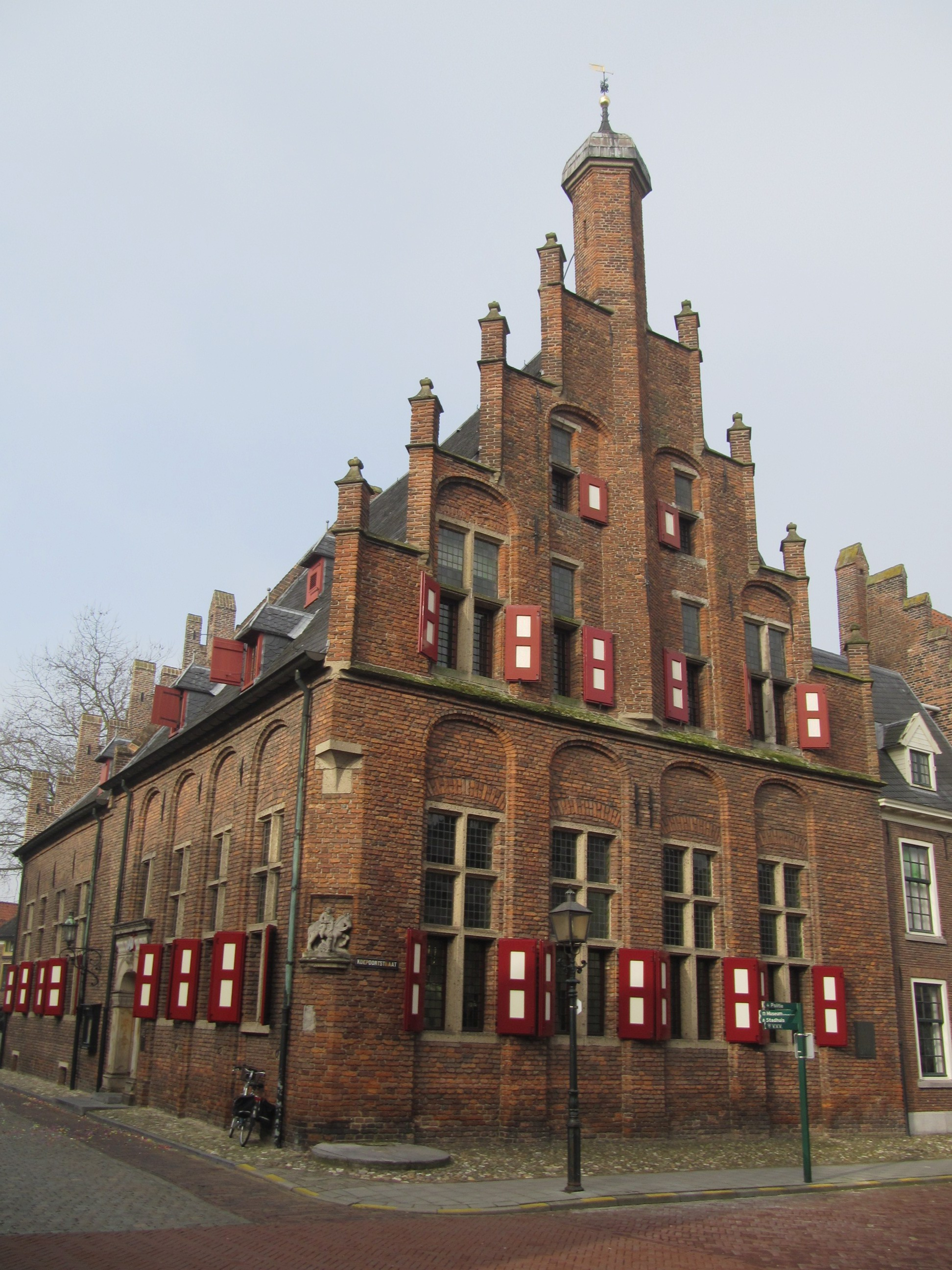 RM13060 Doesburg - Roggestraat 2.jpg